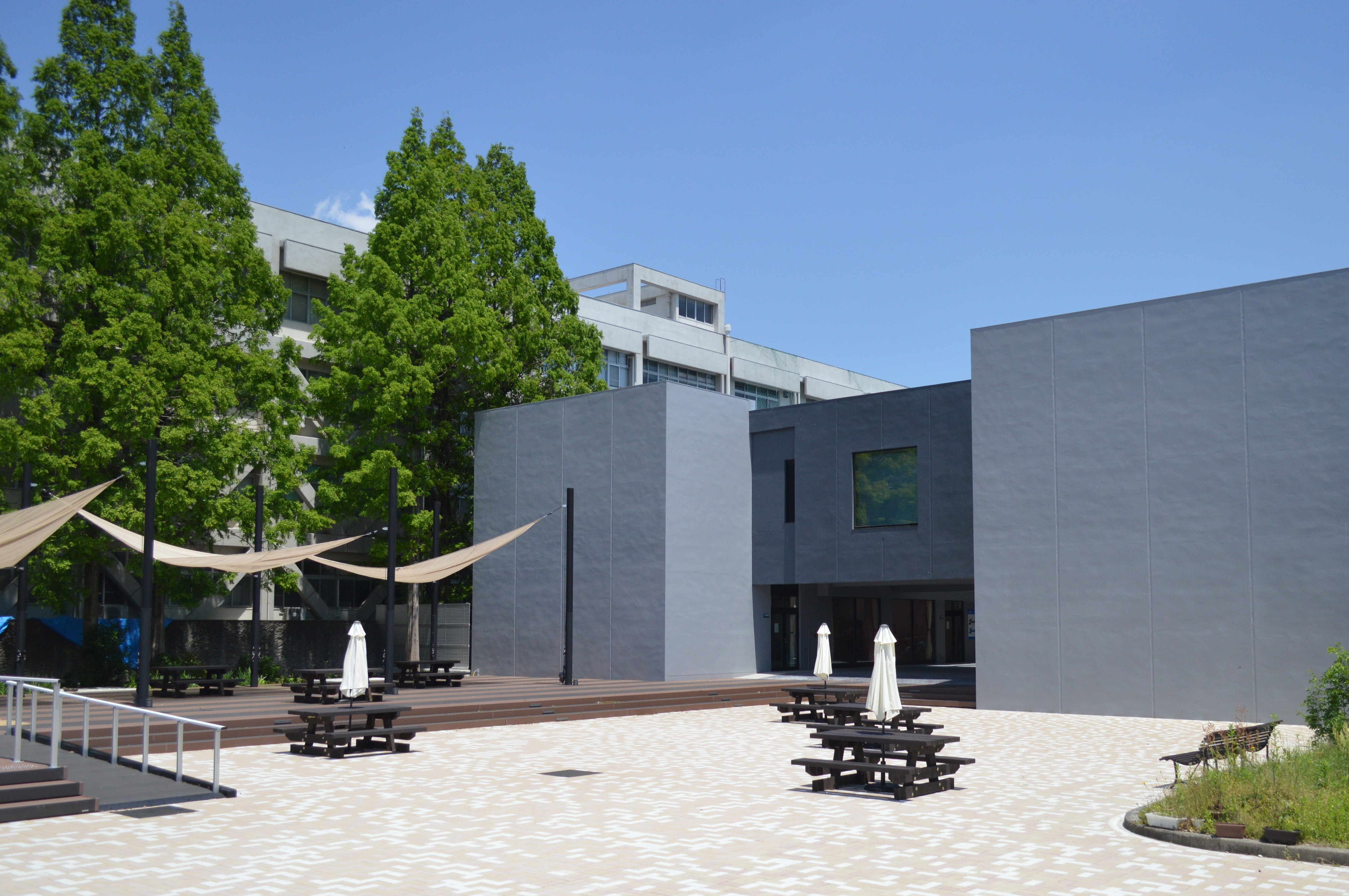 愛知教育大学の美術第一実習棟